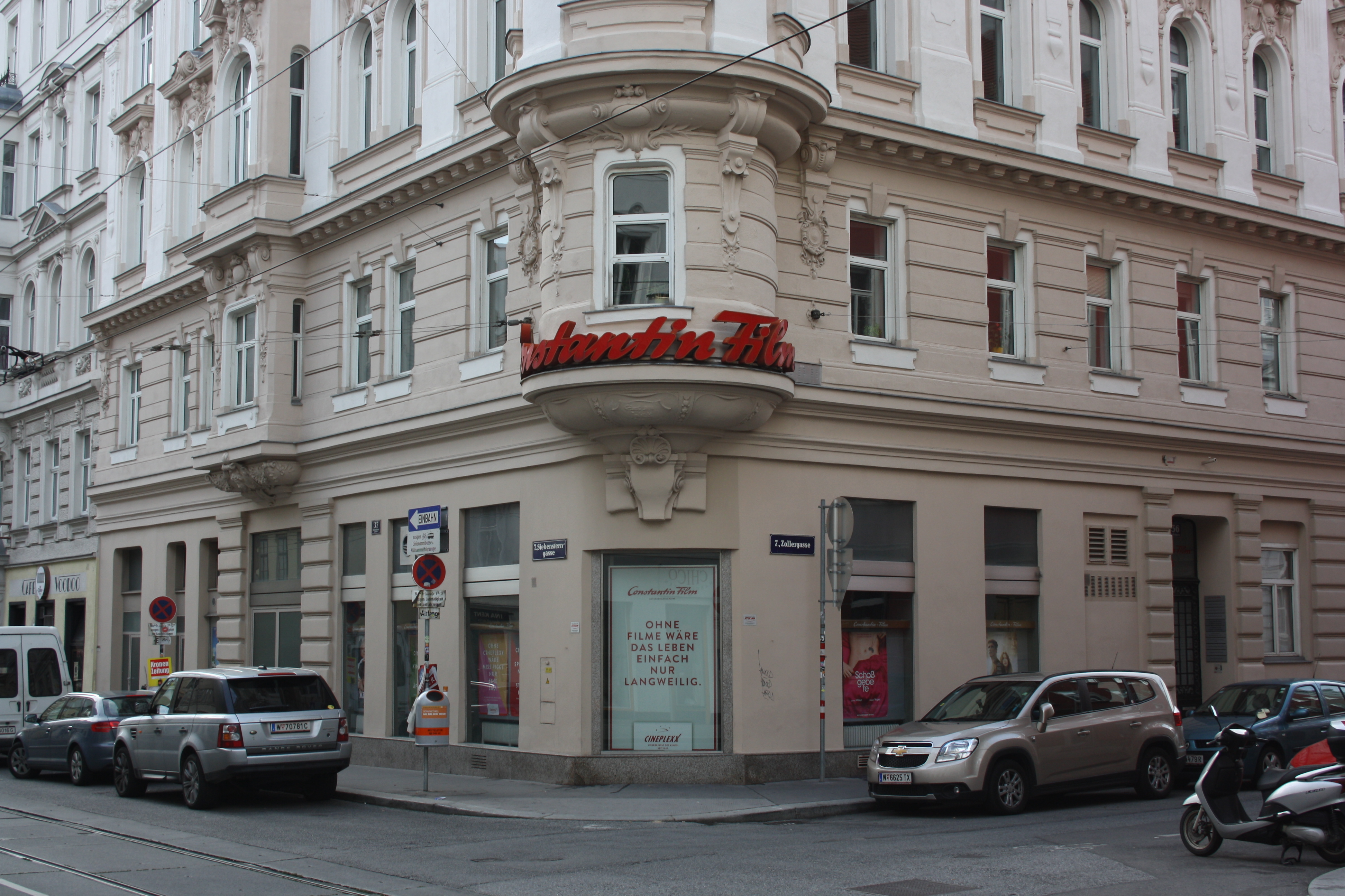 Constantin Film-Holding im Wohn- und Bürohaus Siebensterngasse 37 / Zollergasse 26, Wien-Neubau.